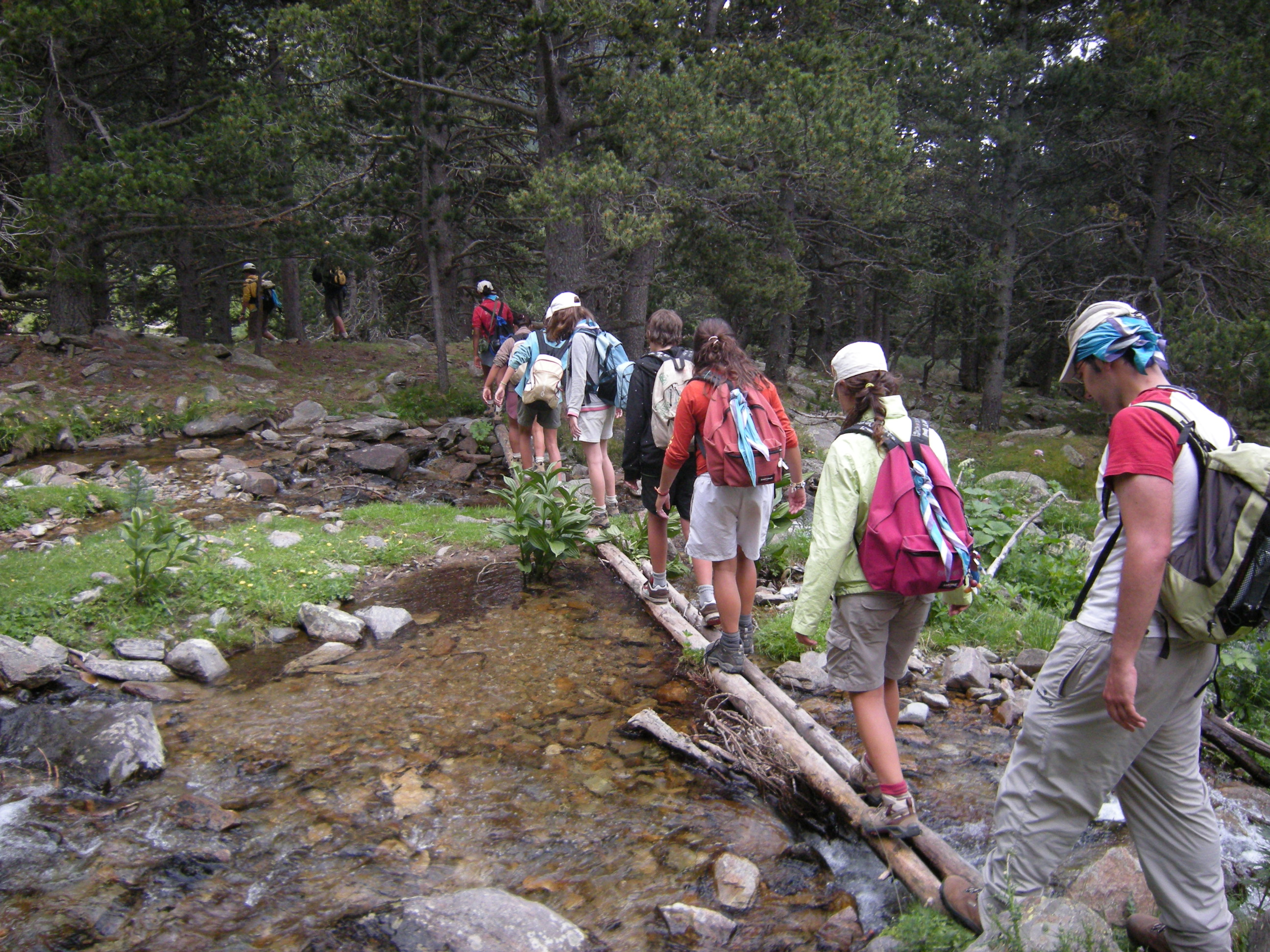 Excursió a la muntanya.